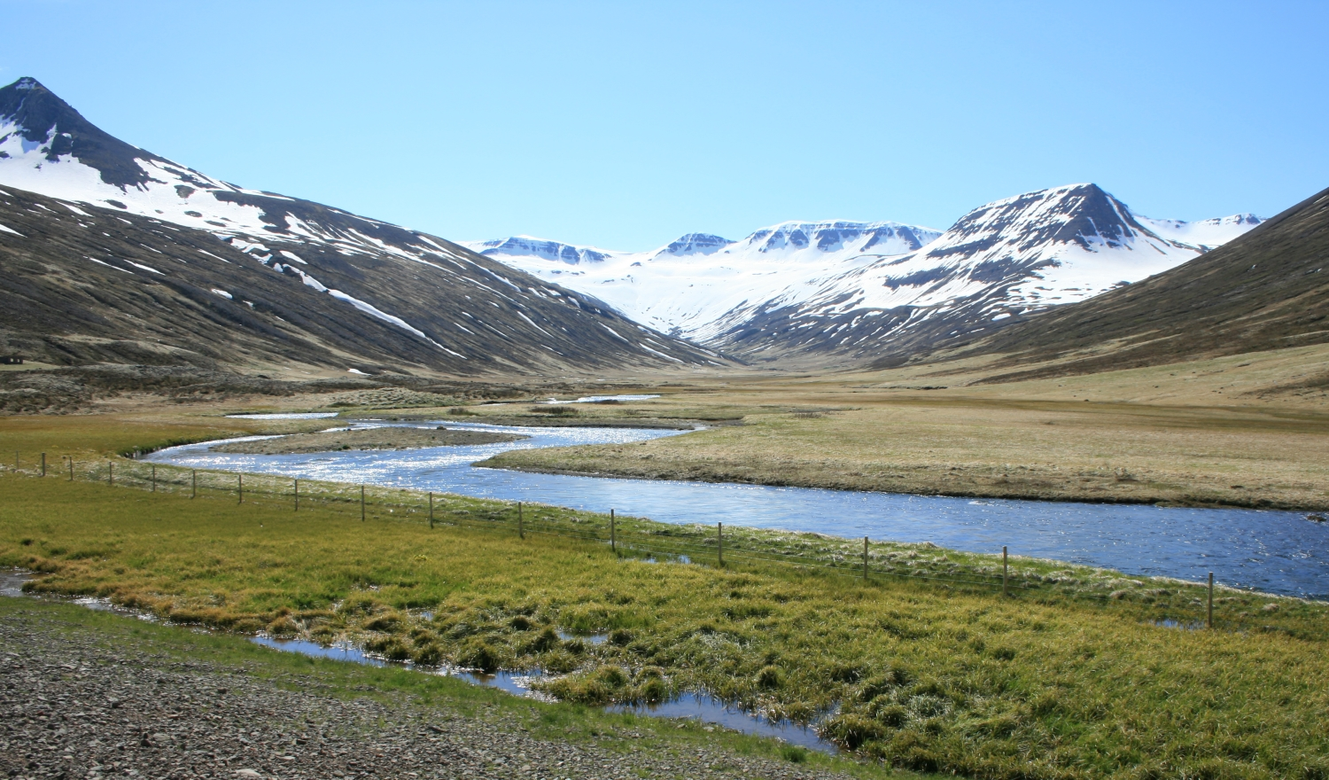 Myndin er tekin af þjóðveginum og inn Héðinsfjarðardal